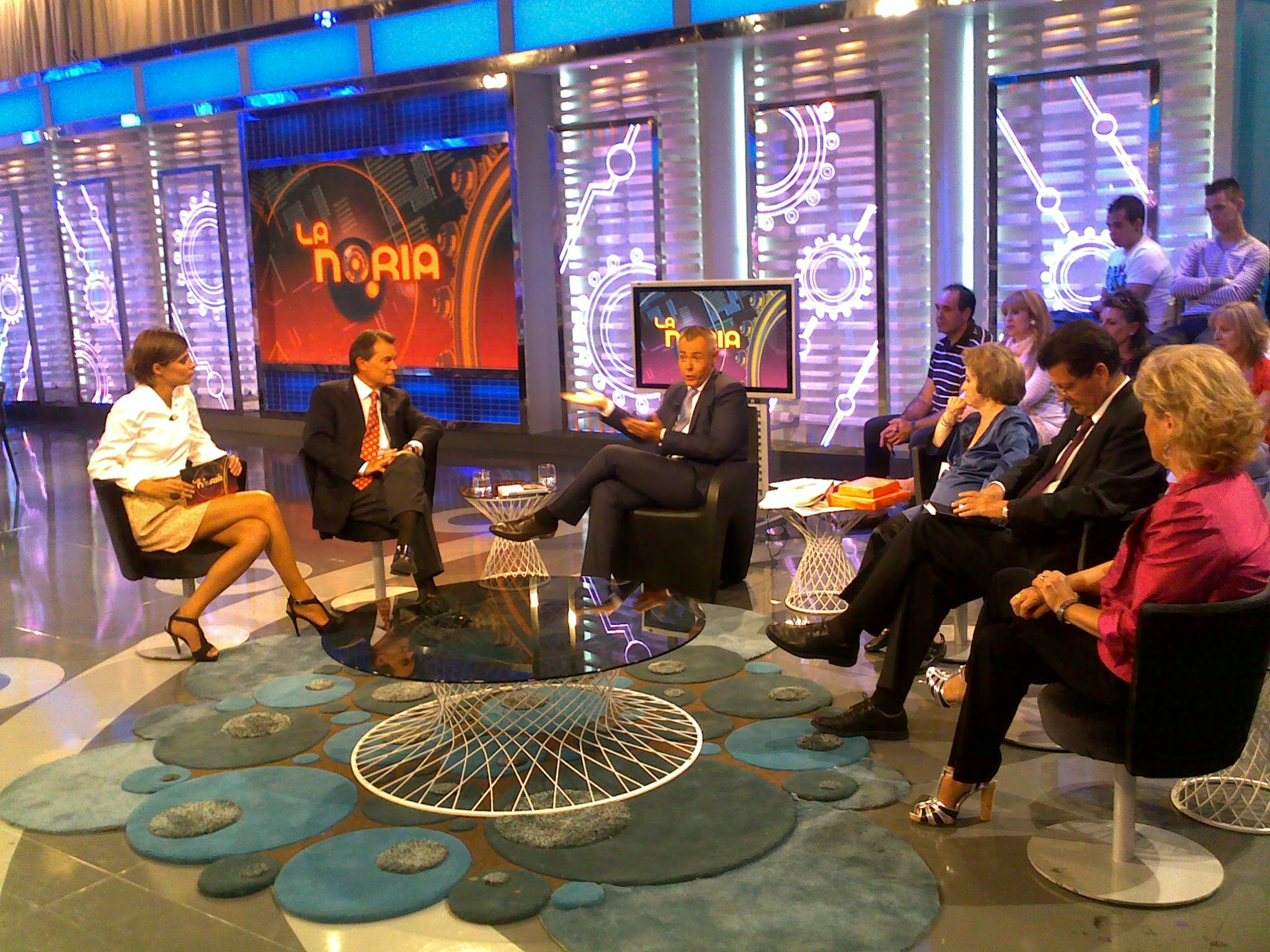 Programa de televisión "La noria" con Sandra Barneda, Jordi González y Artur Mas